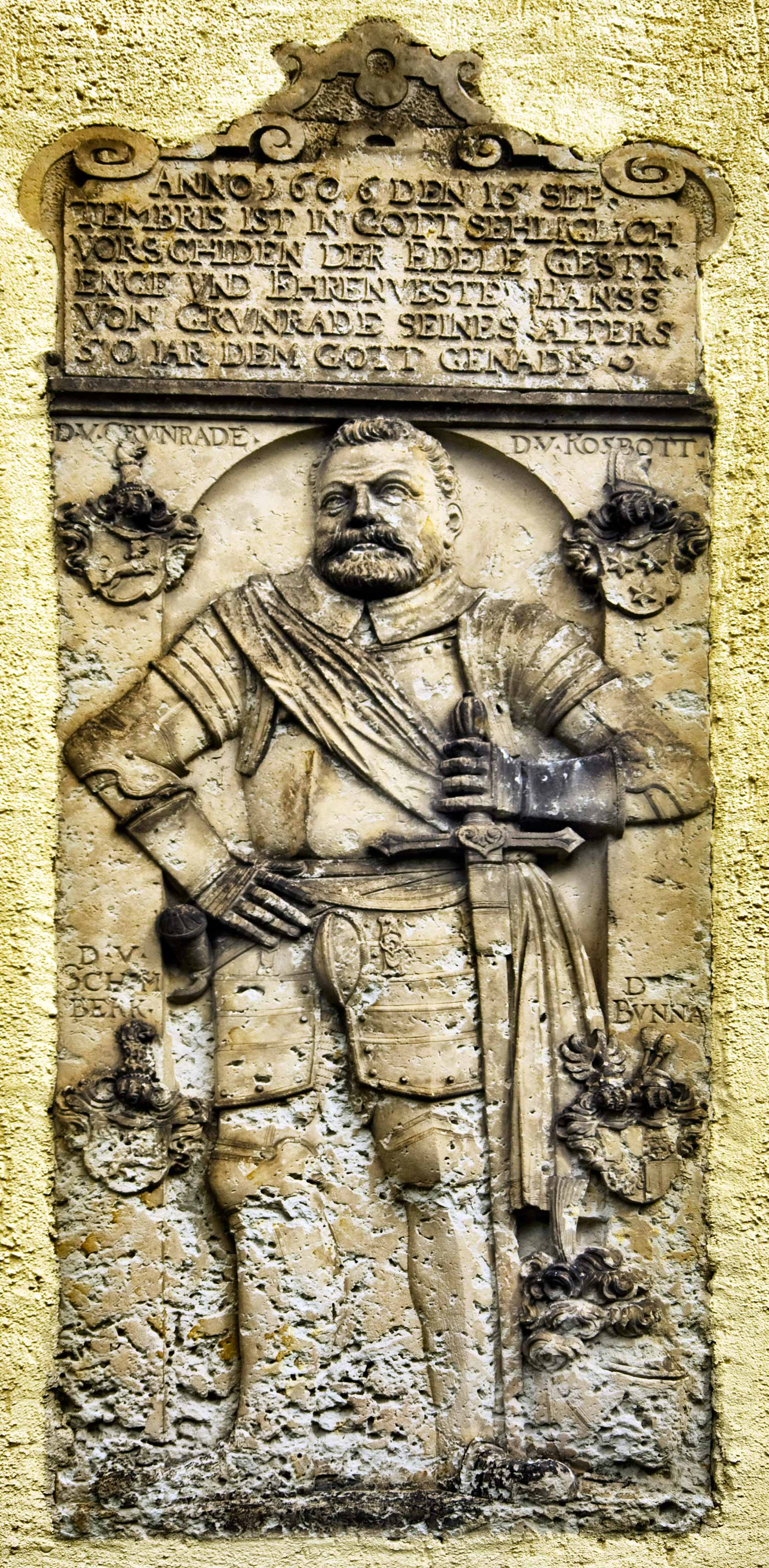 Denkmal des Hans von Grünrode 15. September 1606, Kirche Liptitz, Gemeinde Wermsdorf, Sachsen